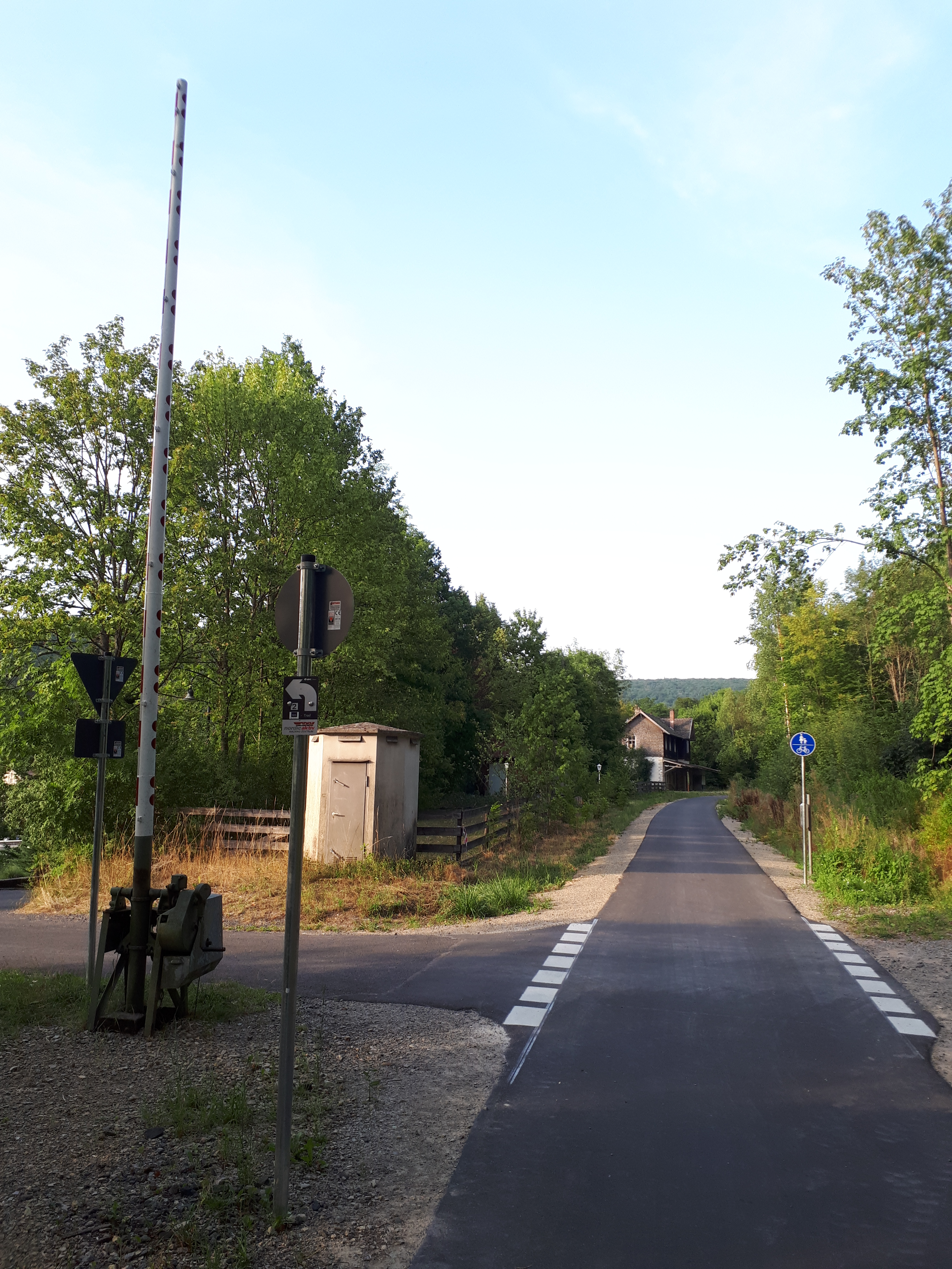 Rhönexpress- Bahnradweg Zeitlofs – Wildflecken, ehemalige Sinntalbahn bei Bad Brückenau Staatsbad